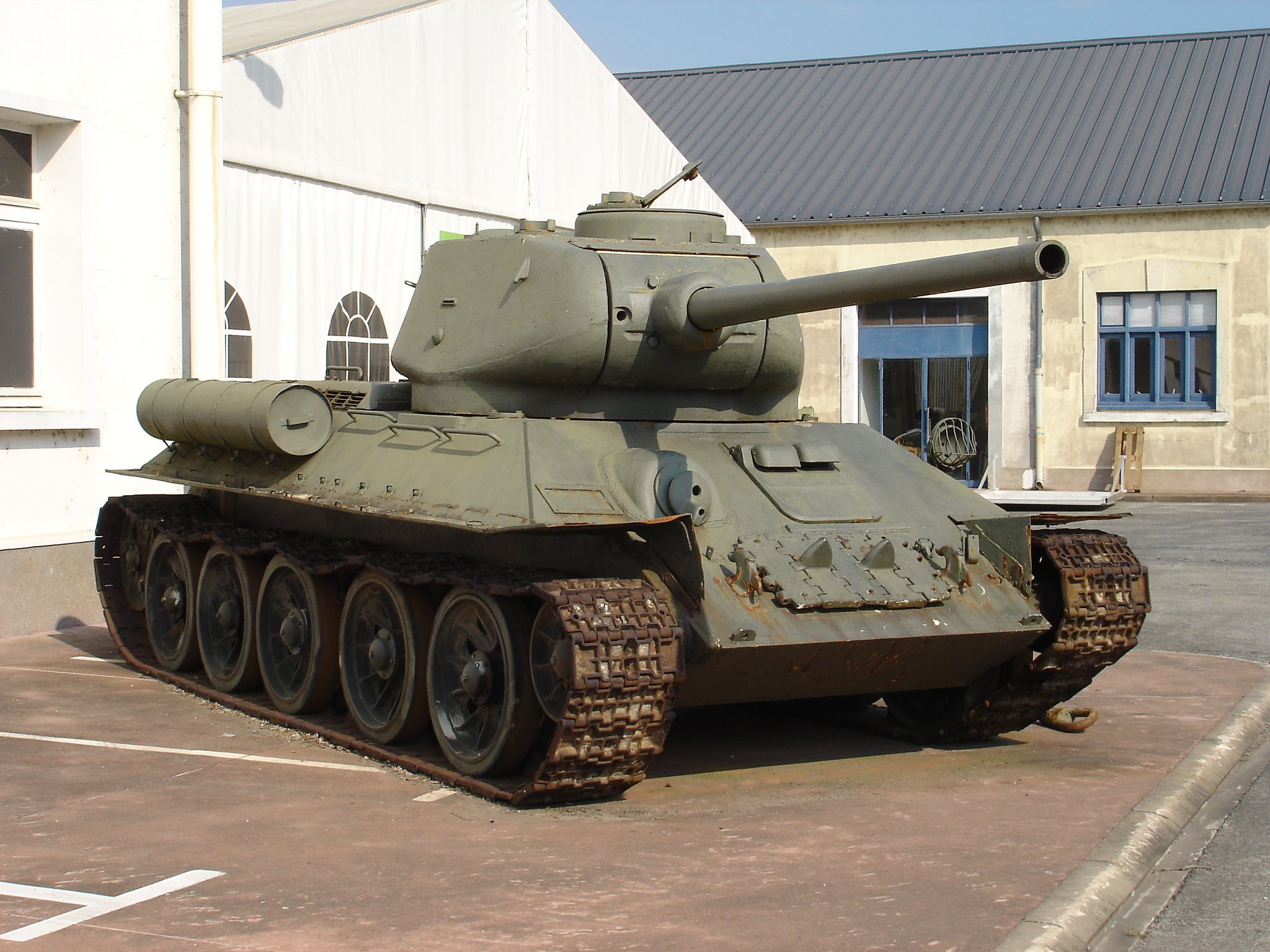 T 34 au musée des blindés de Saumur - T34/85